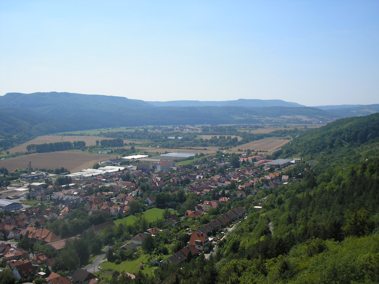 Das Werratal bei Treffurt (Thüringen). Blick von Burg Normannstein nach Westen.